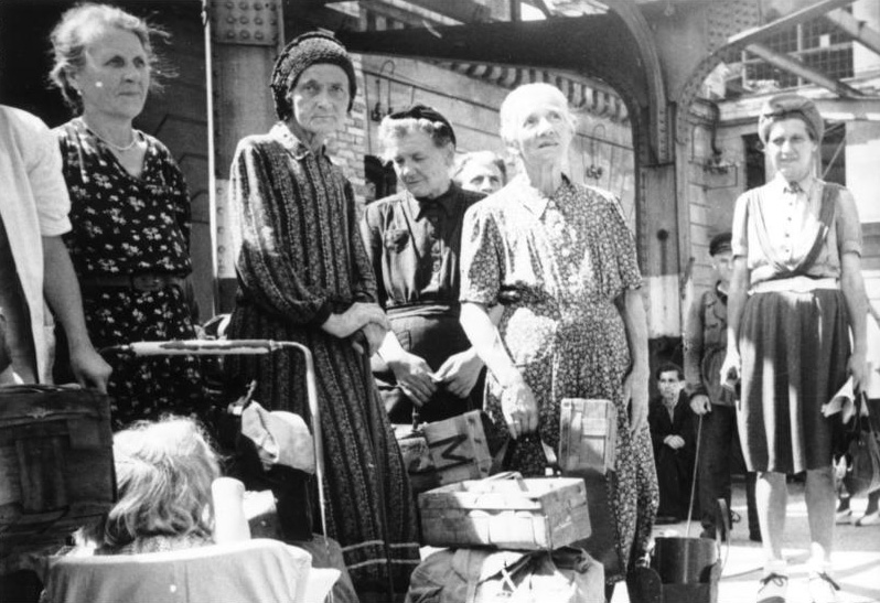 ADN-ZB/Donath Berliner Alltag 1946: Auf dem Bahnsteig des Wriezener Bahnhofs. Sie fahren nach außerhalb, um für sich und ihre Familien etwas Eßbares zu holen.